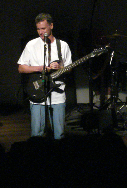 Marcelo Birck, em show no Teatro do SESC, Porto Alegre, 2008